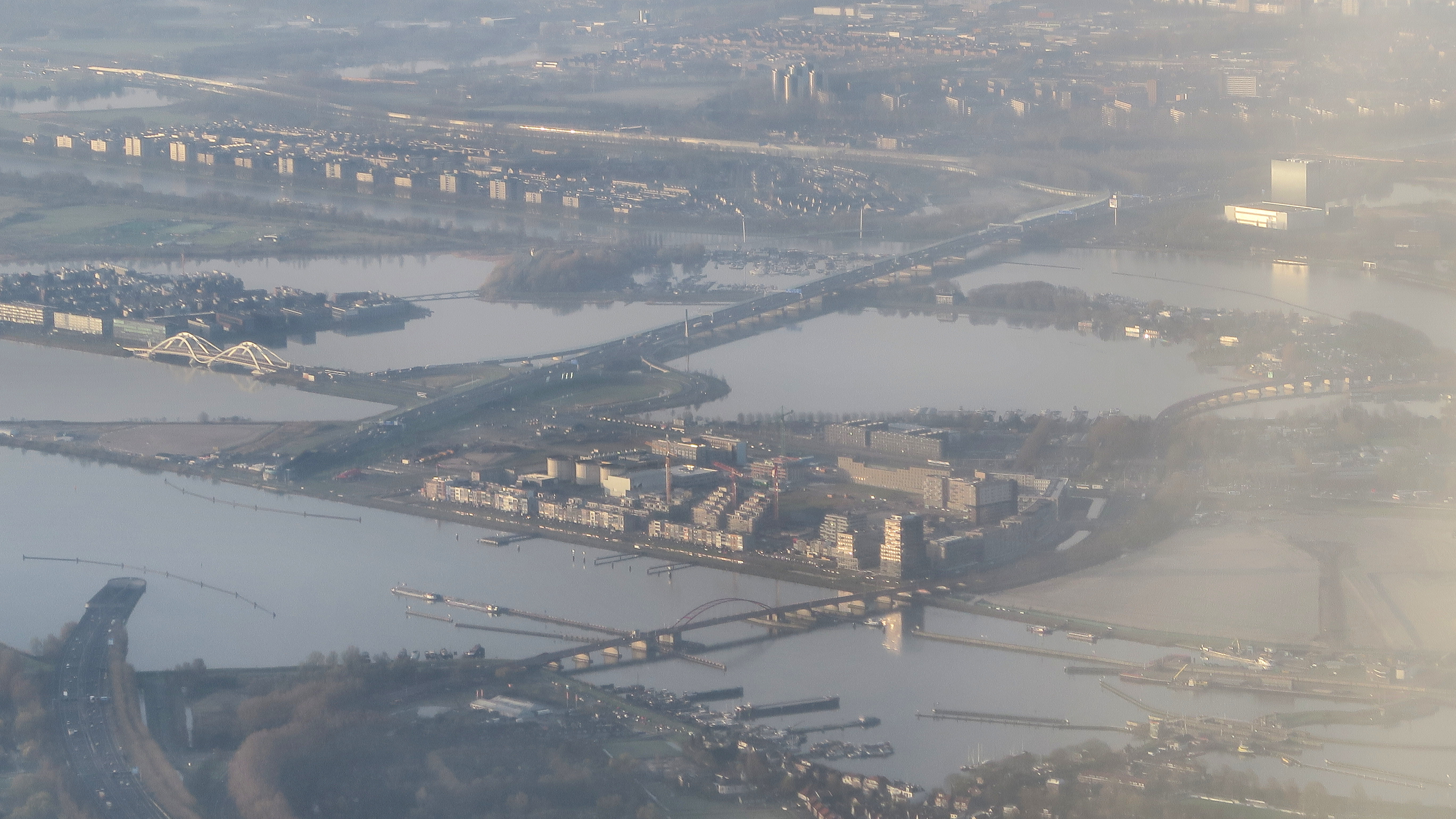 Zeeburg, gezien naar het zuidoosten